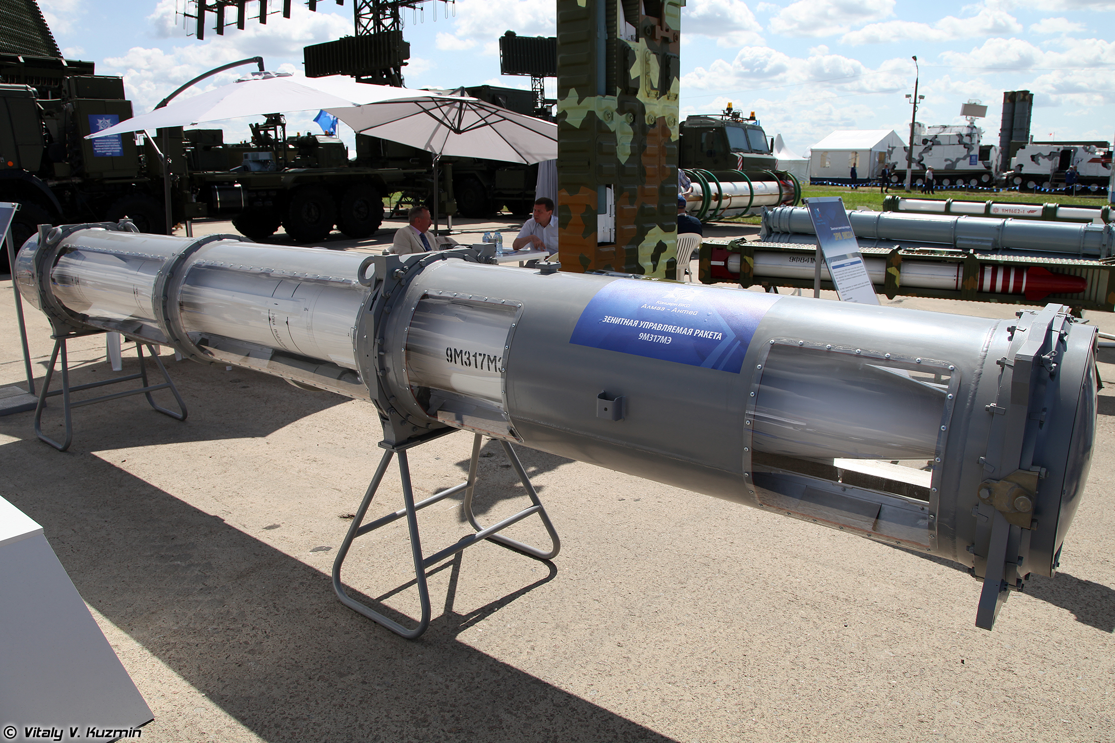 ЗУР 9М317МЭ в транспортно-пусковом контейнере из состава корабельного ЗРК Штиль-1 (9M317ME SAM for Shtil-1 naval air defence system)